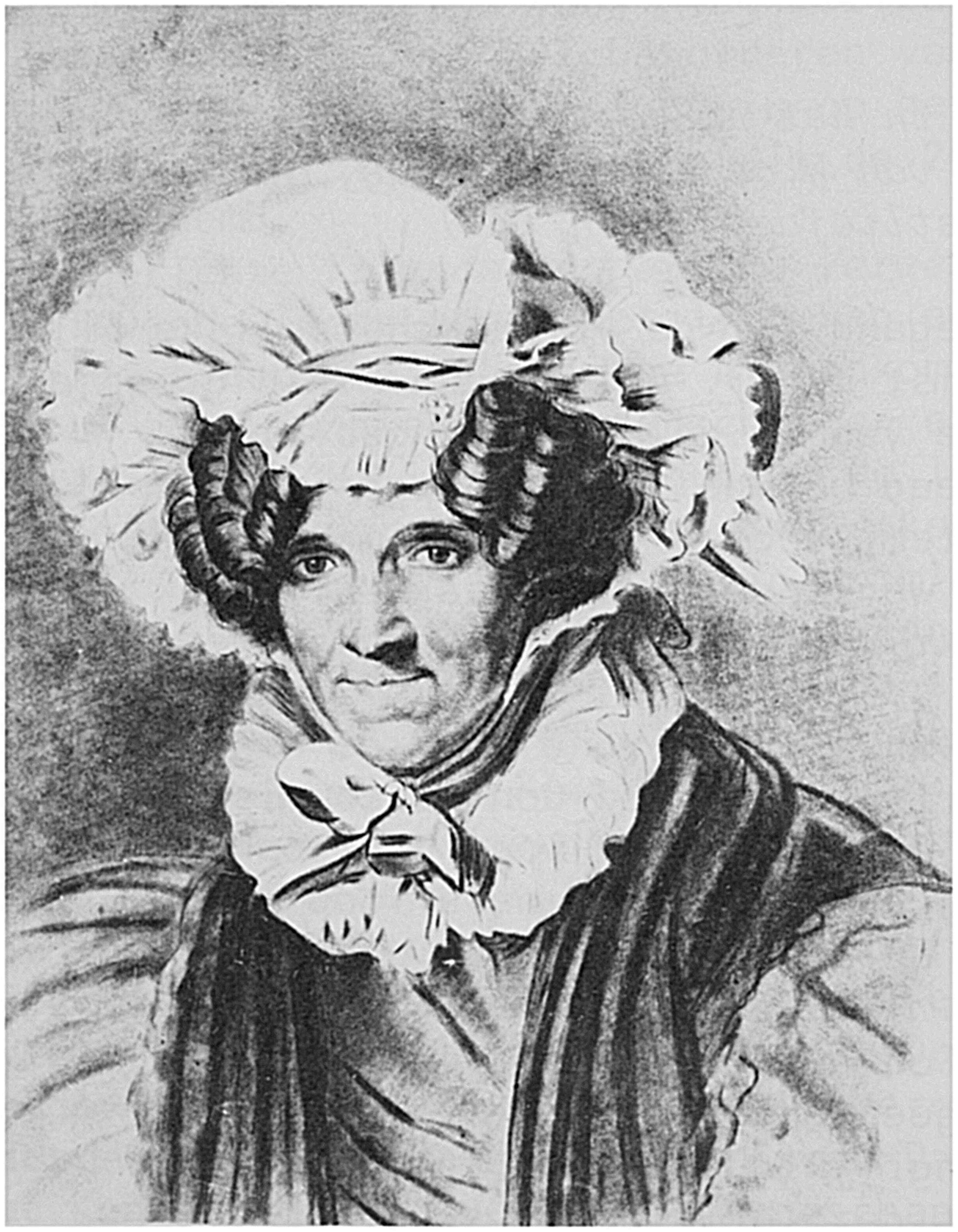 Portret van Margaretha Cornelia Boellaard (1795–1872) DescriptionDutch painterDate of birth/death9 February 17951872--11-05Location of birth/deathUtrechtUtrechtWork periodbetween circa 1810 and circa 1872Work locationUtrechtAuthority control VIAF: 284901668 BPN: 39772615 RKD: 9661